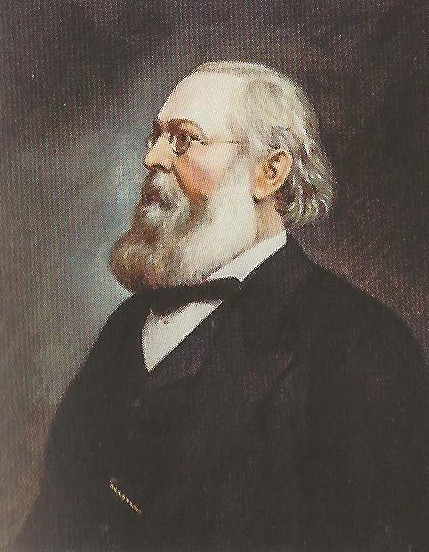 Porträt von Ferdinand von Hochstetter (1829–1884), Rektor der Technischen Hochschule Wien